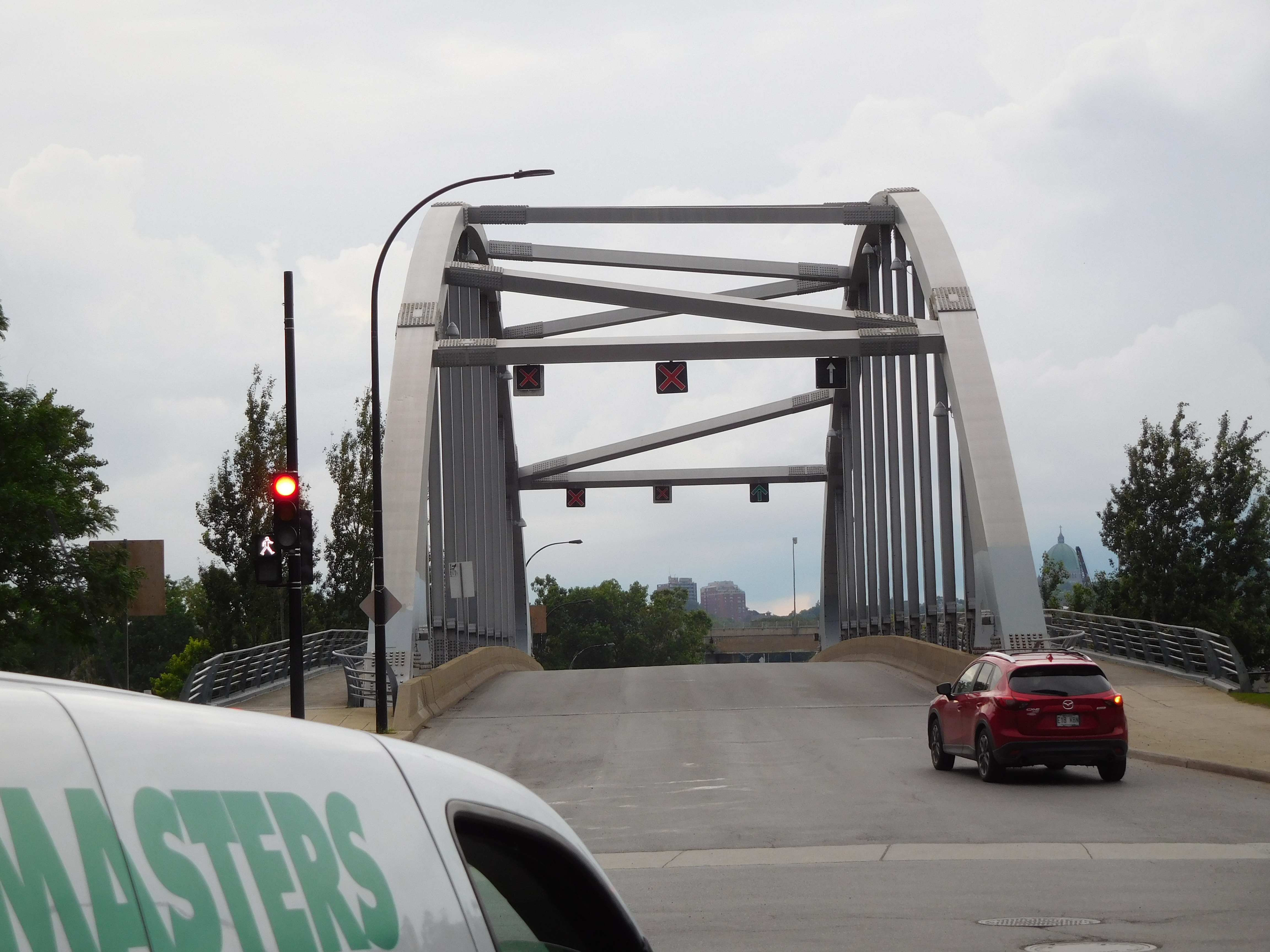 Pont Monk, boulevard Monk, Montréal